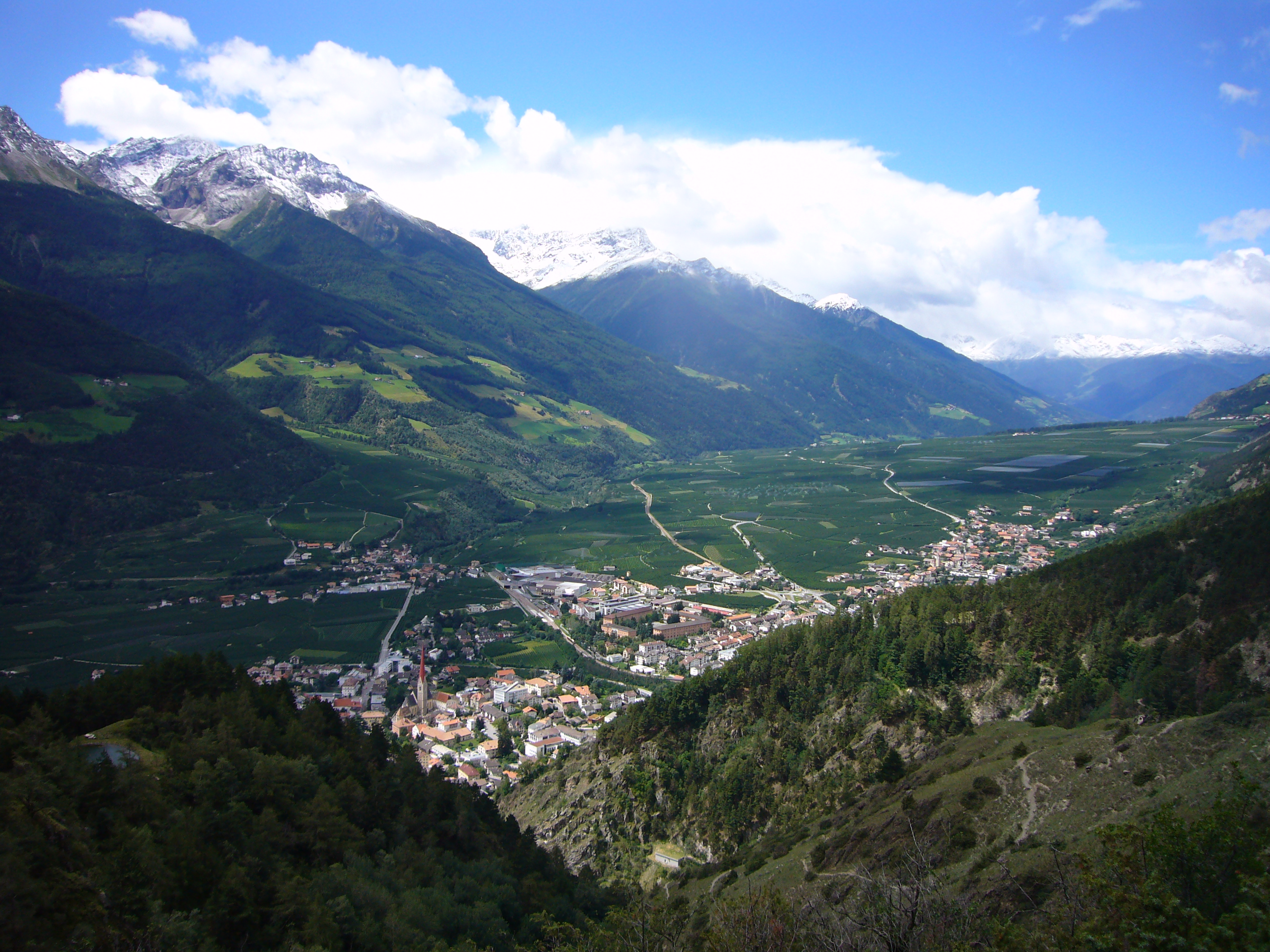 Blick auf Schlanders von Schlandersberg